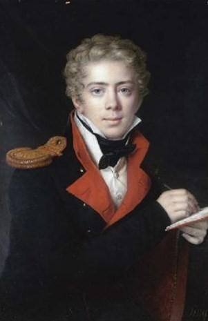 Павел Николаевич Демидов (1796-1840)